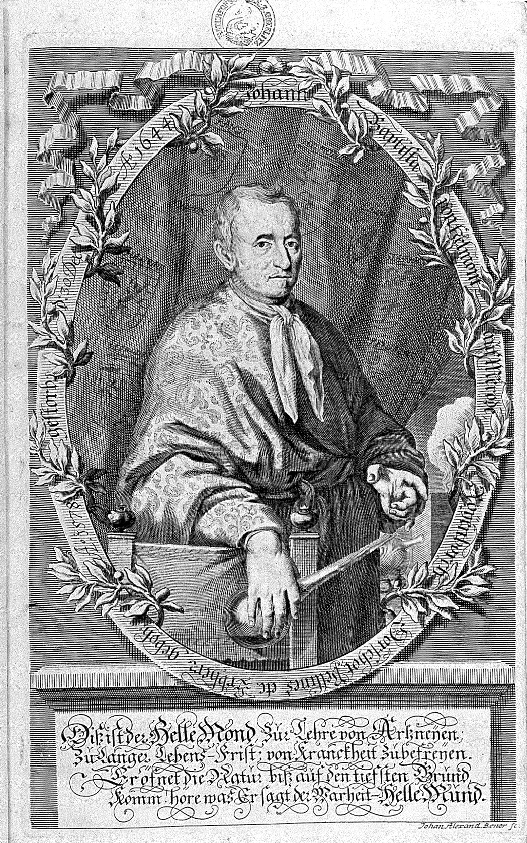 Portrait of J.B. van Helmont. Rare Books Keywords: Jan Baptista van Helmont